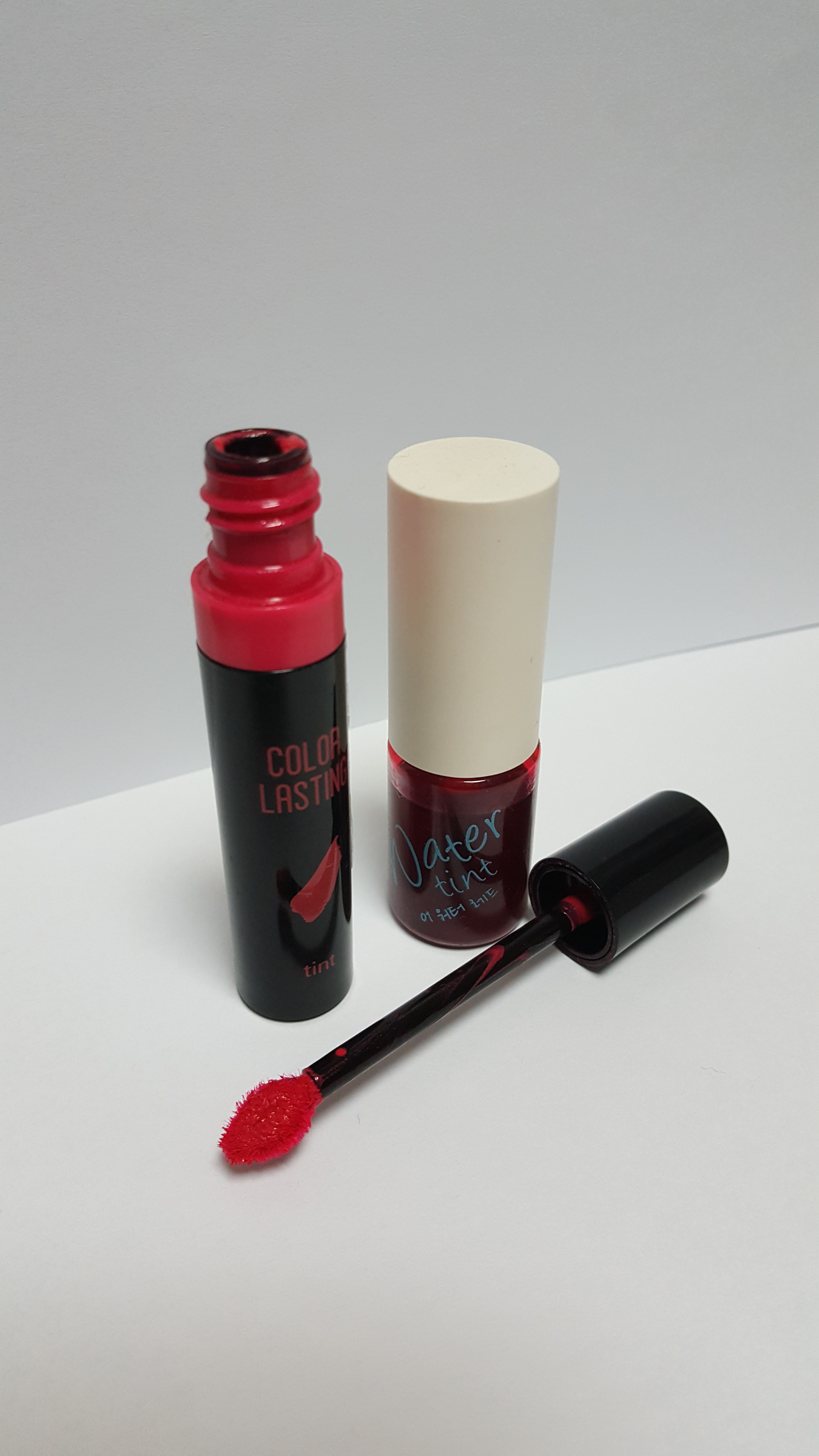 조선말: 틴트 사진